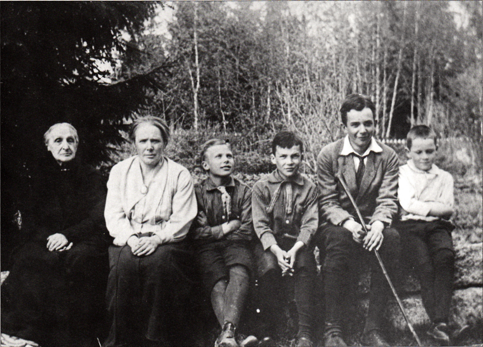 Mormor Marie Sesemann, hennes dotter Maria Parland och barnbarnen Oscar, Ralf, Henry och Herman i Grankulla 1924.